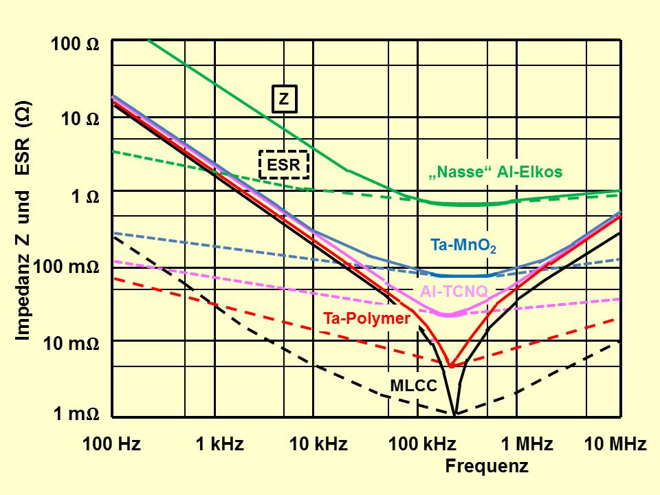 Impedanz und ESR Verläufe unterschedlicher Kondensator-Arten